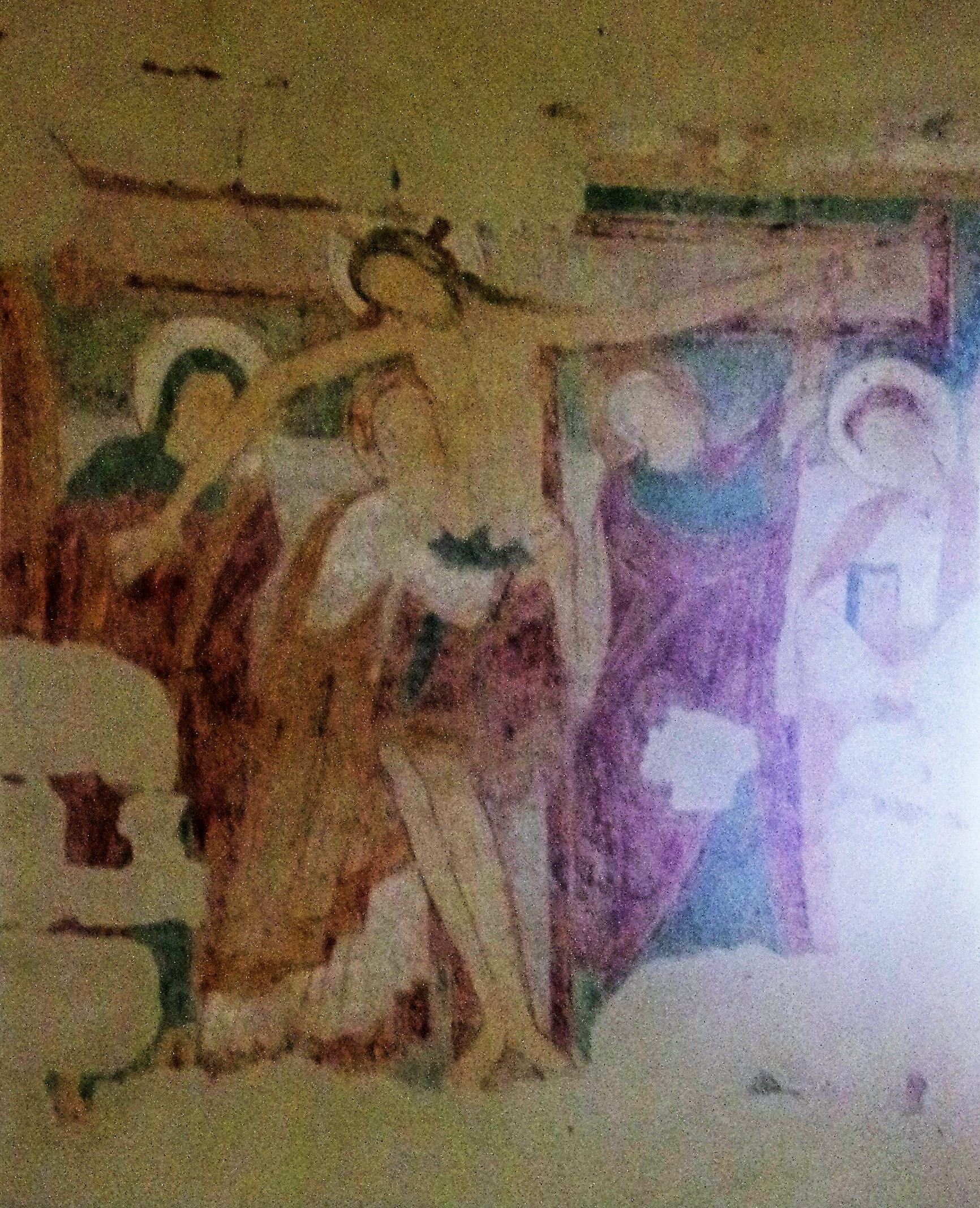 Fresque "Descente de croix"